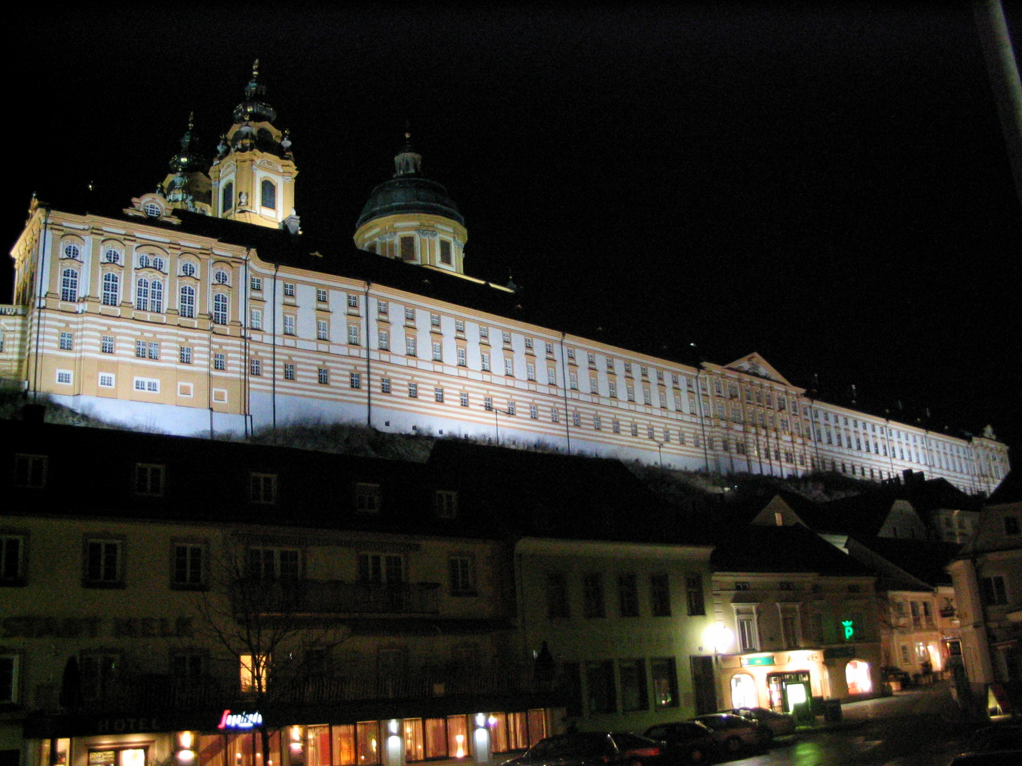 Stift Melk über der Melker Altstadt